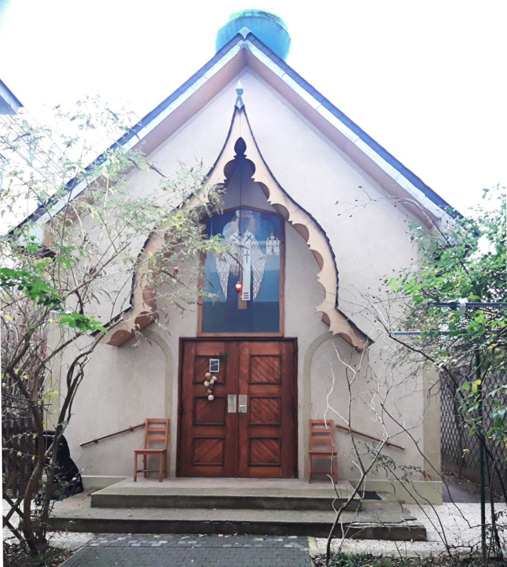 Eglise Saint-Nicolas le Thaumaturge de Boulogne-Billancourt